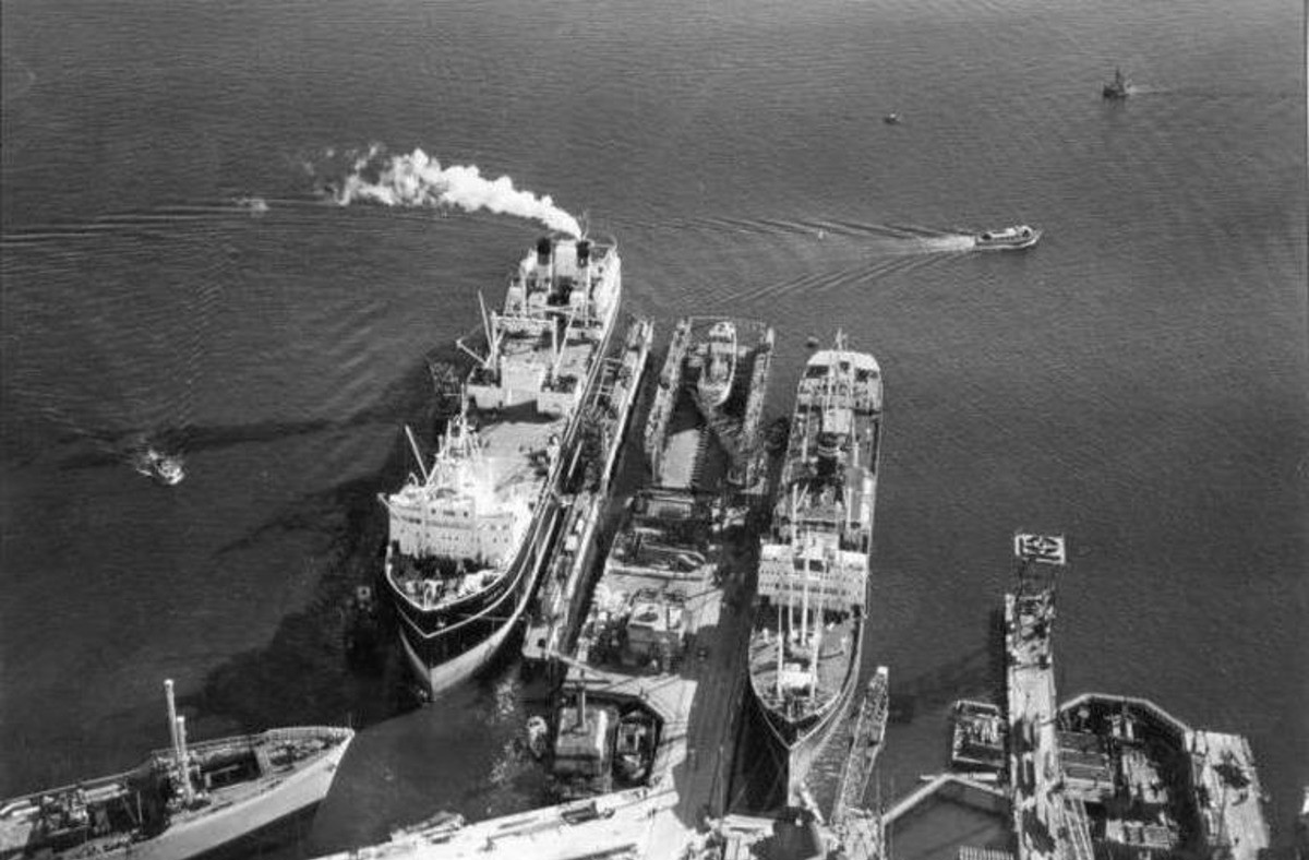 Hvalkokeriet Norhval ved Akers mekaniske verksted. Dette var første hvalfangstselskapet som tok i bruk helikopter i hvalsøk på slutten av 1950-årene. Helikopterdekket kan skimtes bak skorstenene.